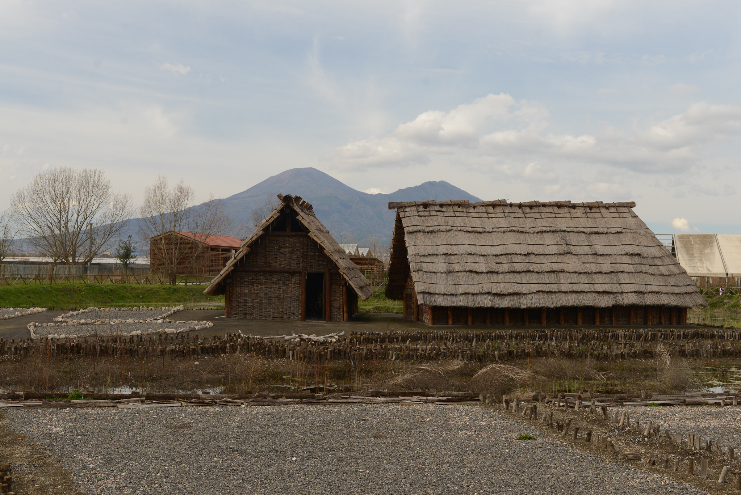 Parco archeologico del sito archeo-fluviale di Longola. Capanne del villaggio preistorico